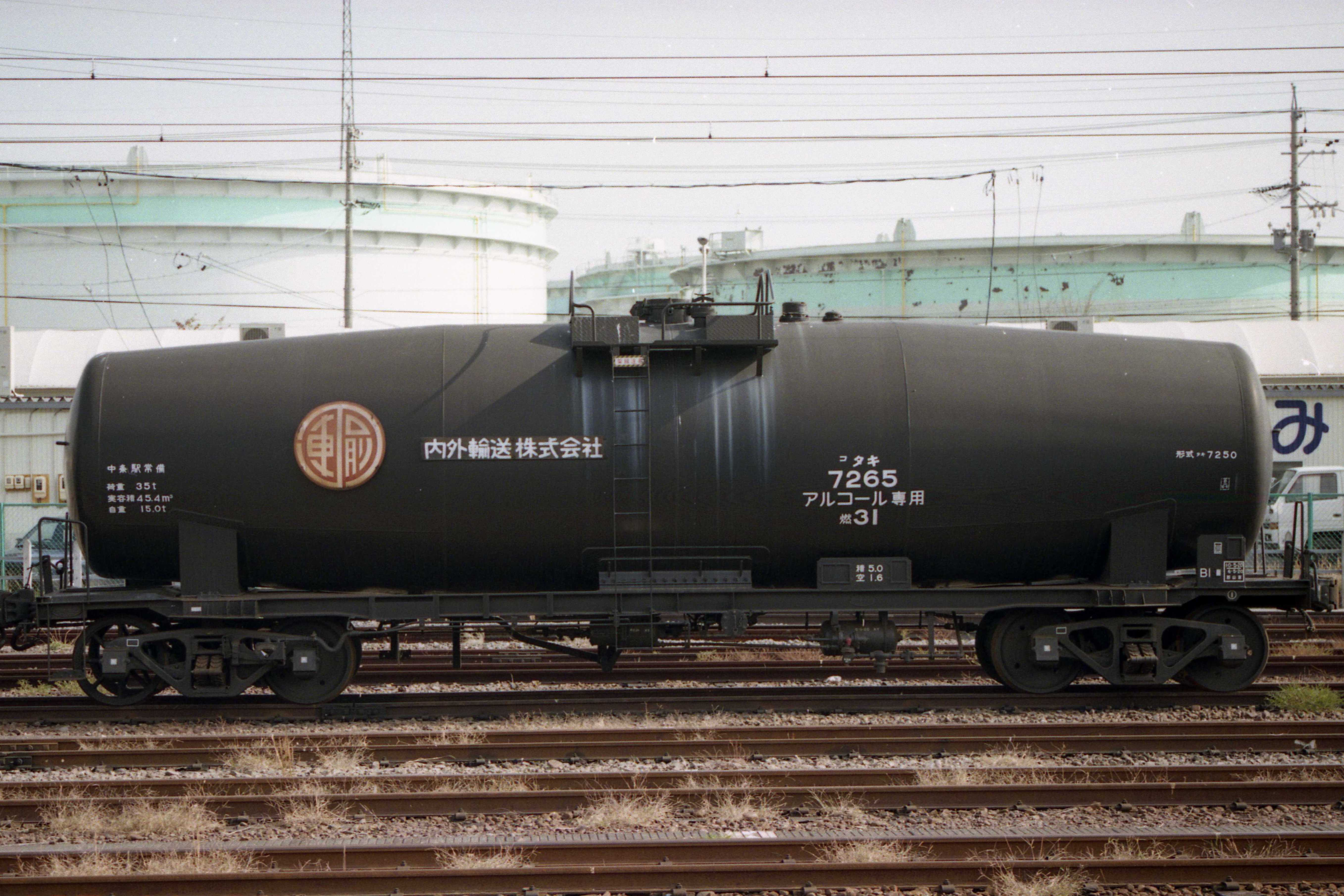 タキ7250形タキ7265。内外輸送所有。1995年11月23日、清水駅にて。